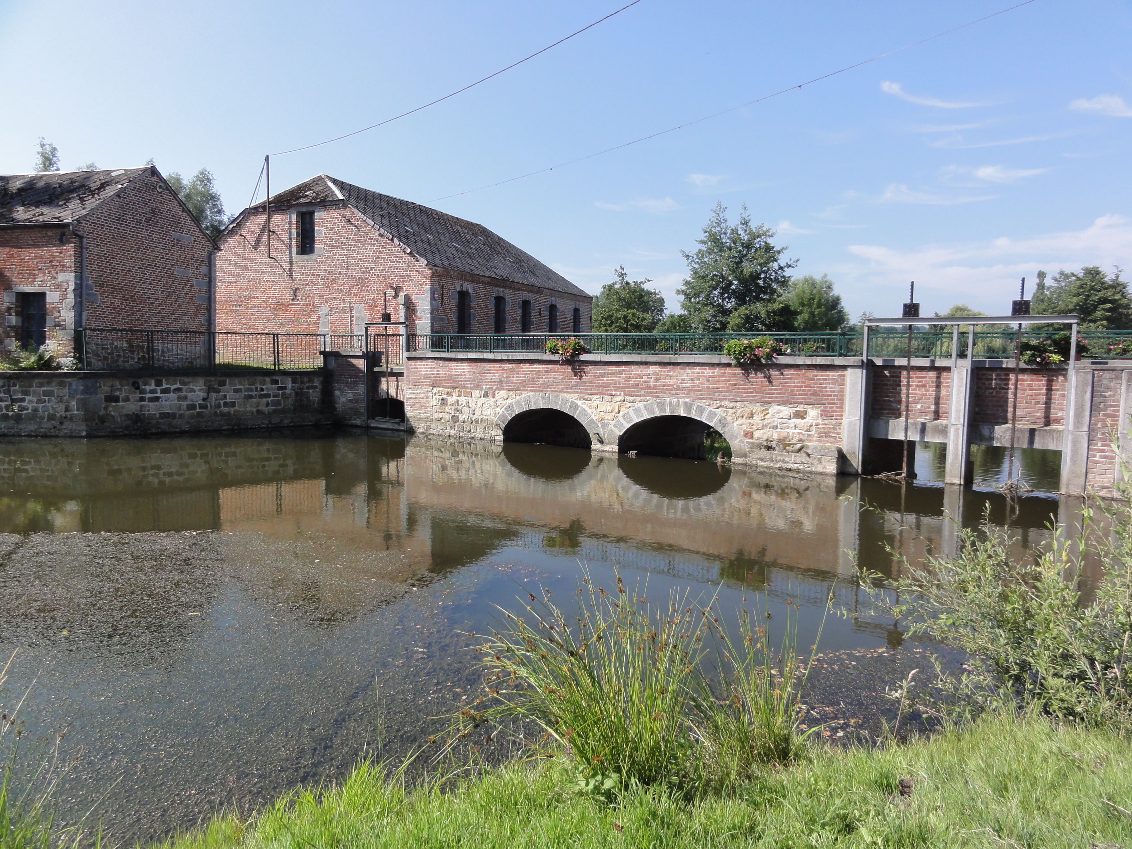 Liessies (Nord, Fr) pont et moulin Helpe Majeure